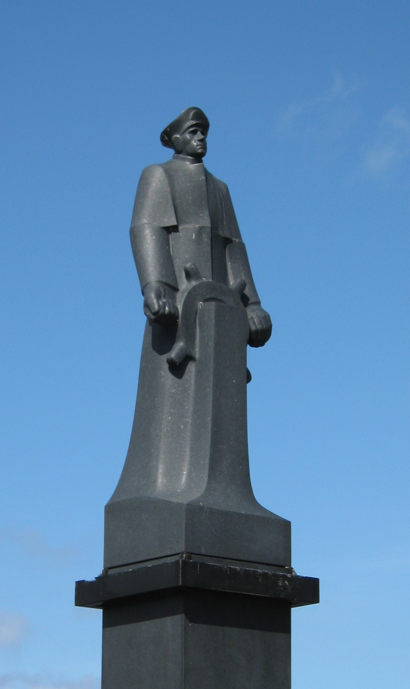 Statue av Leif Andreas Larsen (Shetlands-Larsen) på Zachariasbryggen i Bergen.